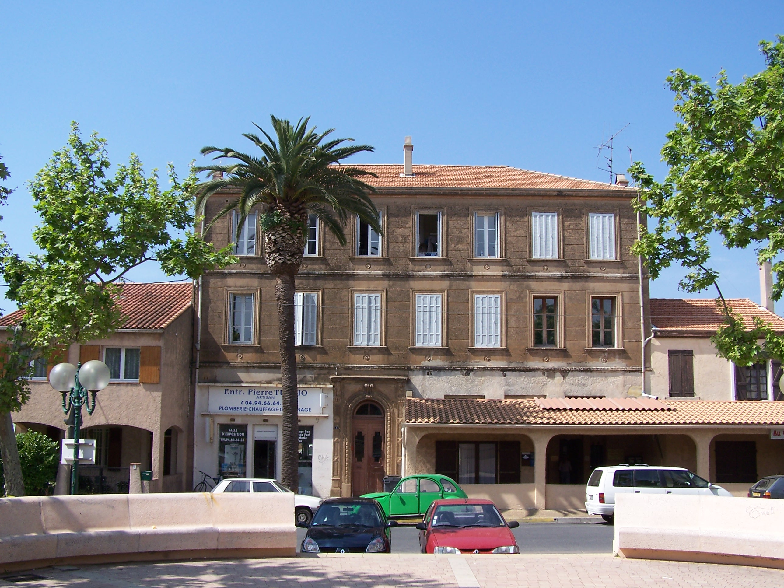 La Londe-les-Maures (Var, France) : Vue du n°6 de la place Allègre.